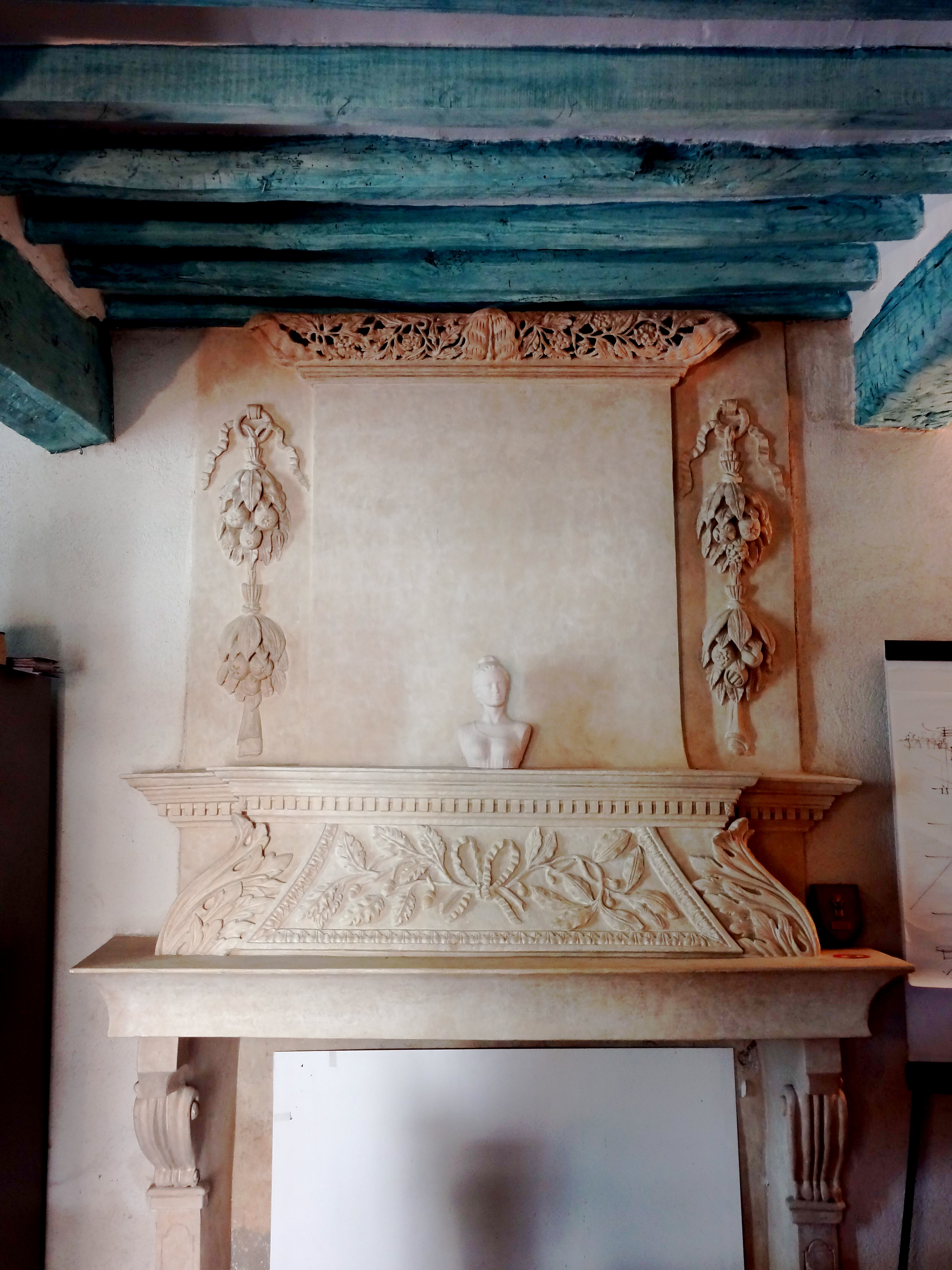 cheminée de gypserie de la mairie d’Aubenas-les-Alpes, XVIIIe siècle (ancien presbytère)